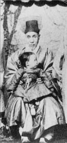 홍순목 (1816 ~ 1884), 조선 말기의 정치인